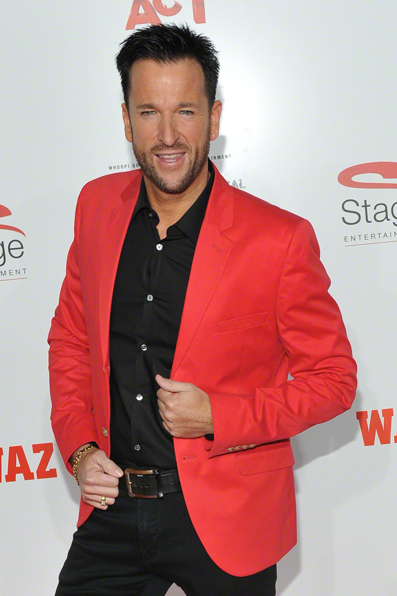 Michael Wendler auf einer Musical-Premiere in Oberhausen am 3. Dezember 2013.